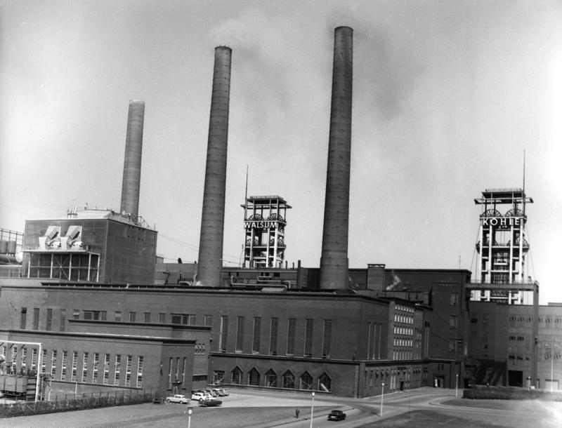 Zeche Walsum bei Walsum Bergwerkgesellschaft Walsum m.b.H. seit 1927 täglich 15000 to. Vorrat 1,3 Milliarden to.